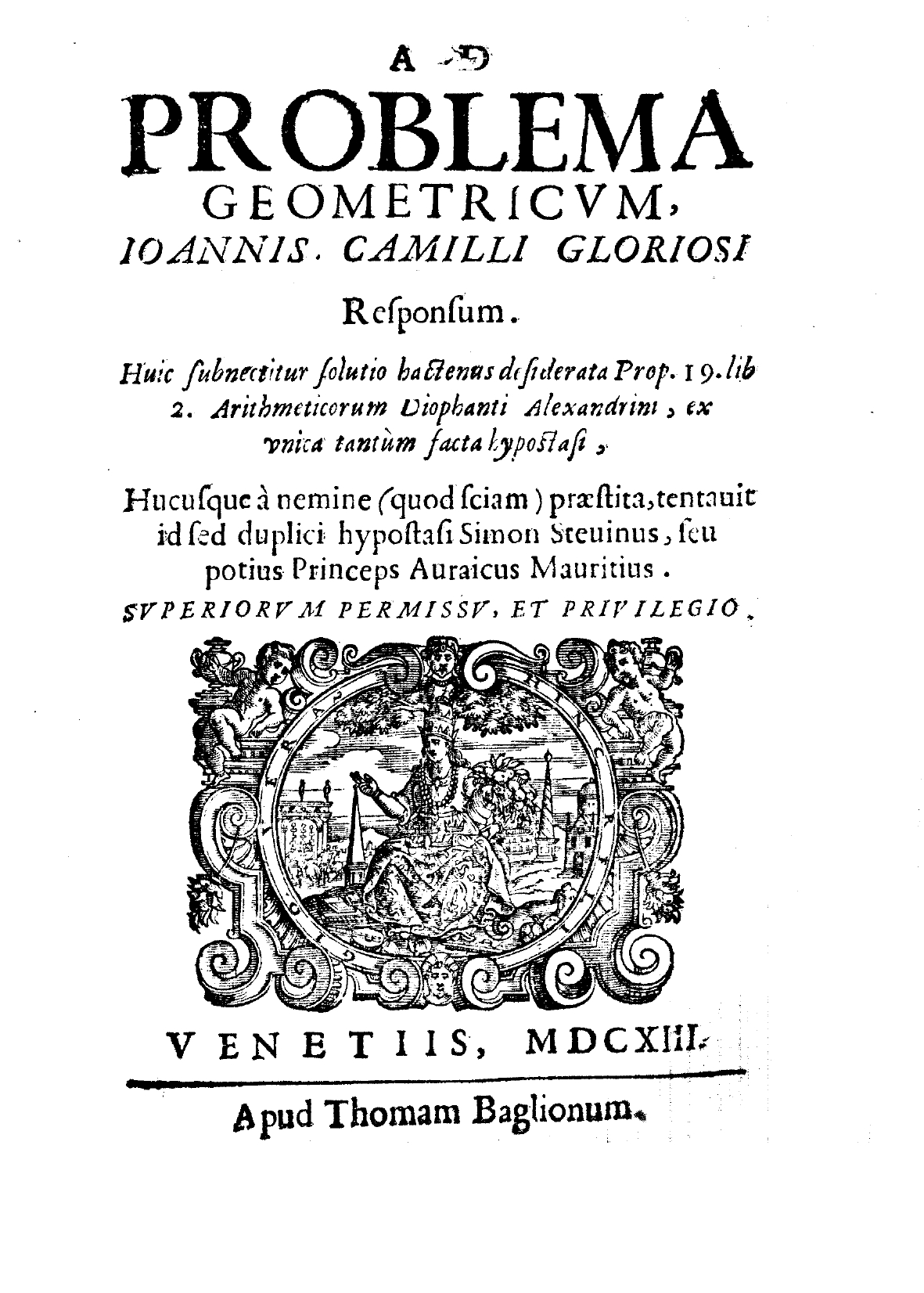 Frontespizio